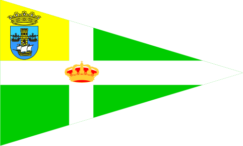 Bandera del Real Club Náutico de Laredo